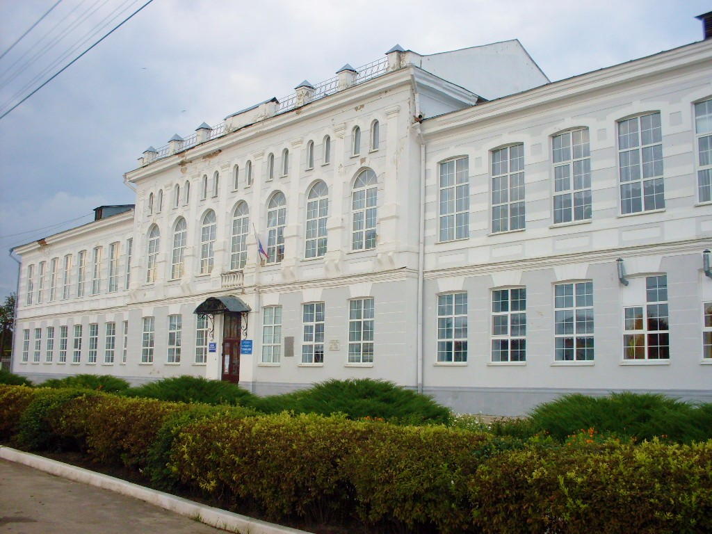 Здание мужской гимназии, где была провозглашена советская власть в Болховском уезде: улица Ленина, 58, Болхов, Болховский район, Орловская область